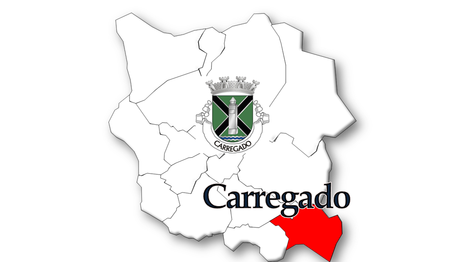 Evolução da População